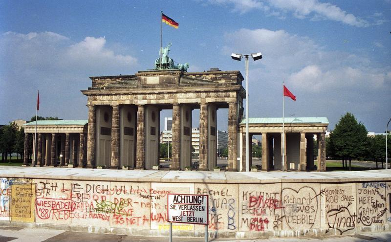 Juni 1988 Berlin, Brandenburger Tor, Mauer